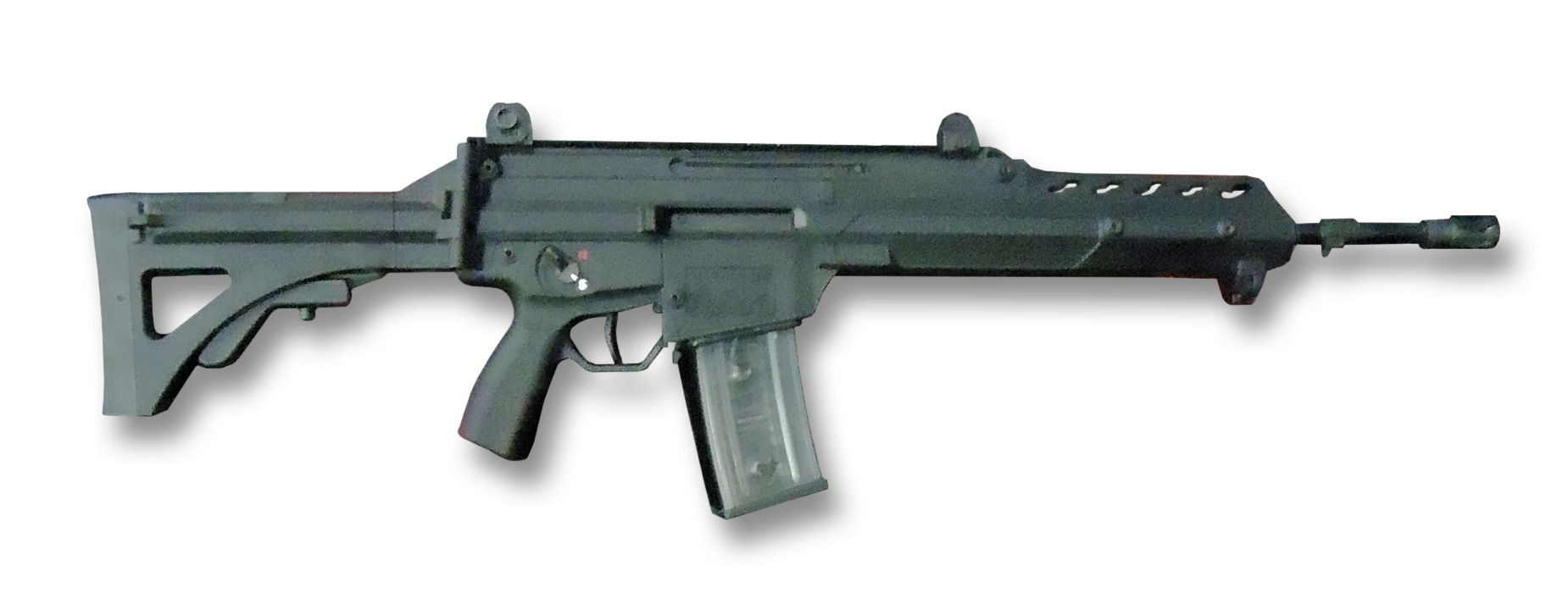 Sturmgewehr "Fusil FX-05" (Mexiko)